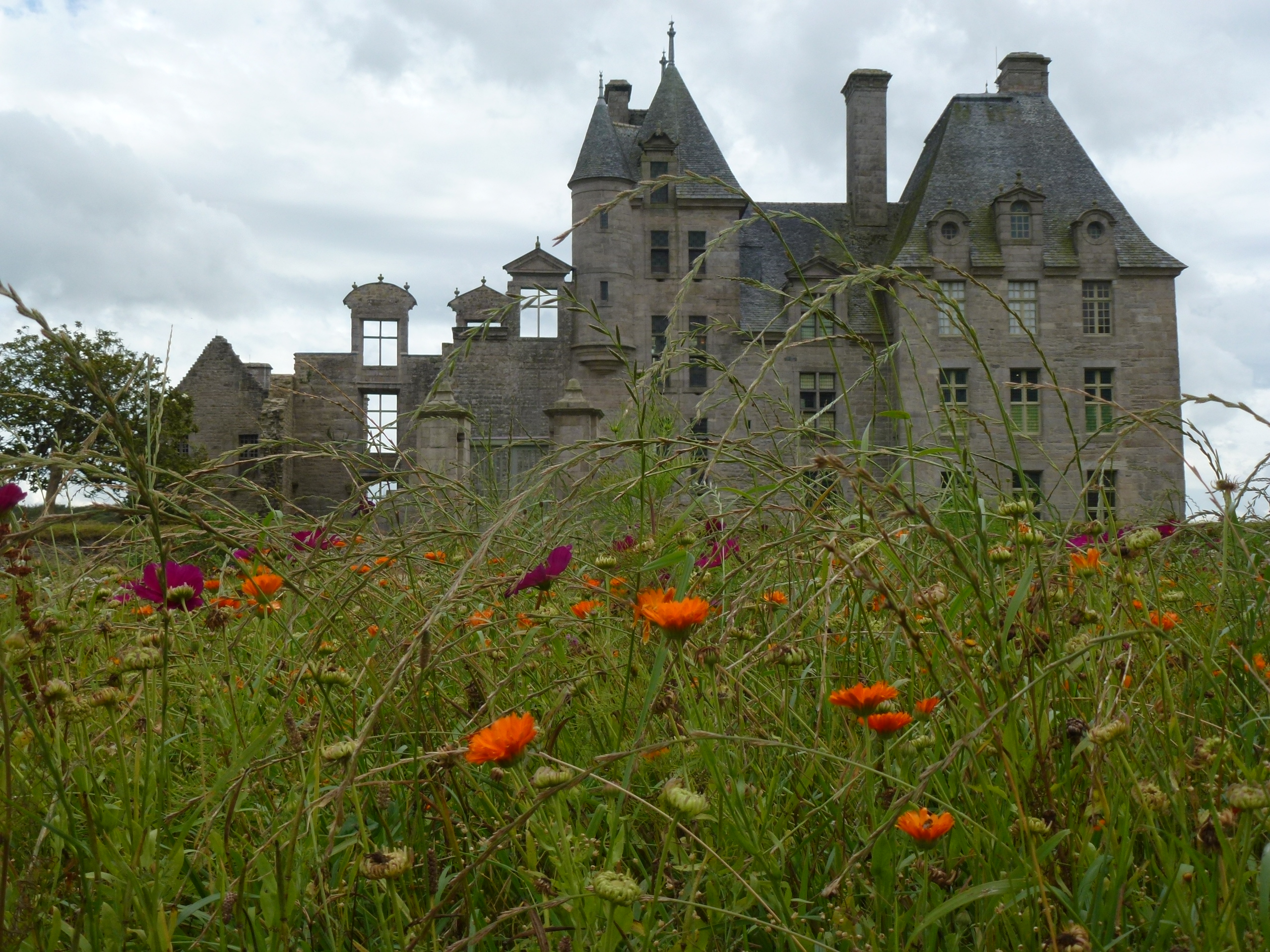 Façade nord du château de Kerjean en Saint-Vougay (29).